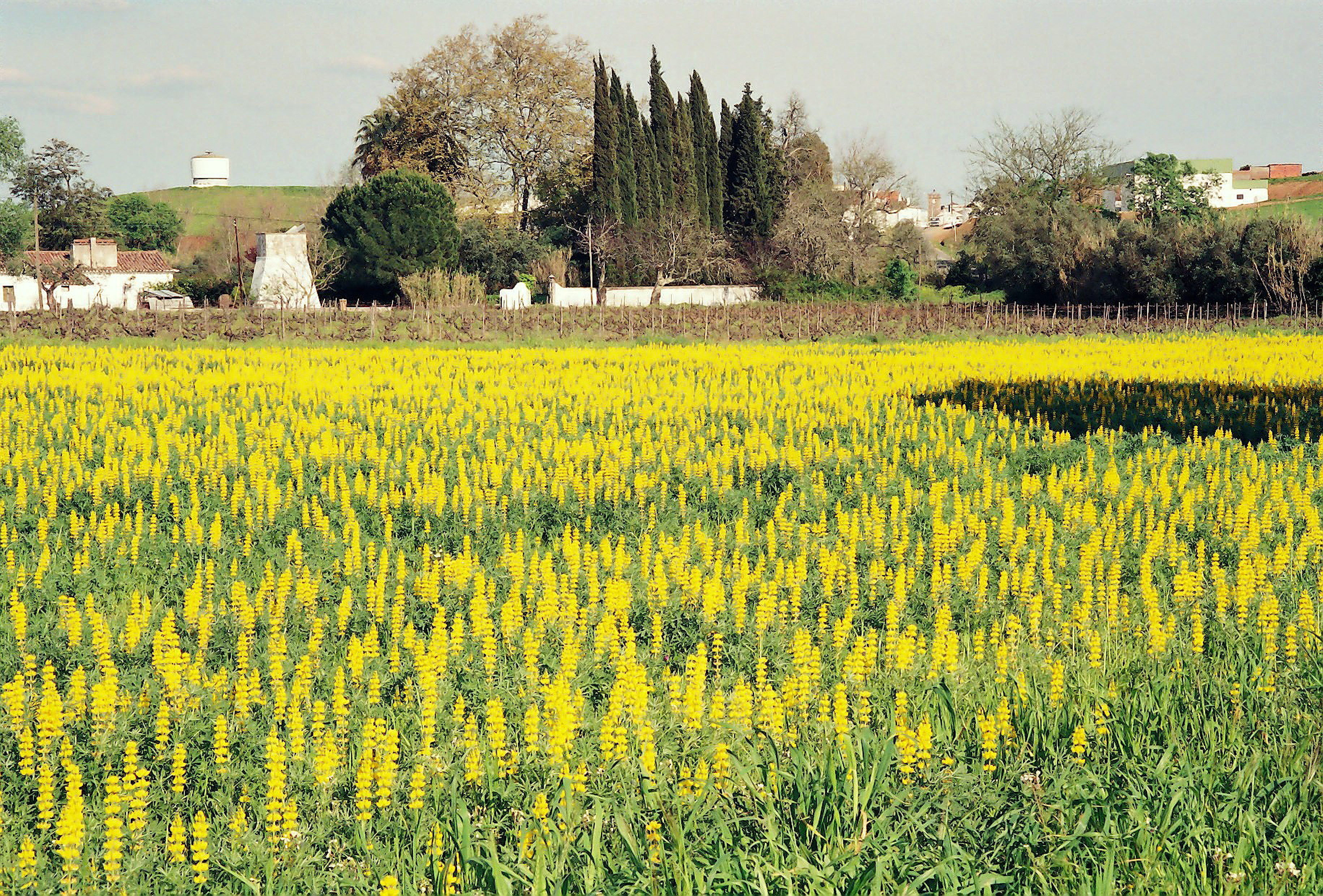 Vila de Frades - Vidigueira